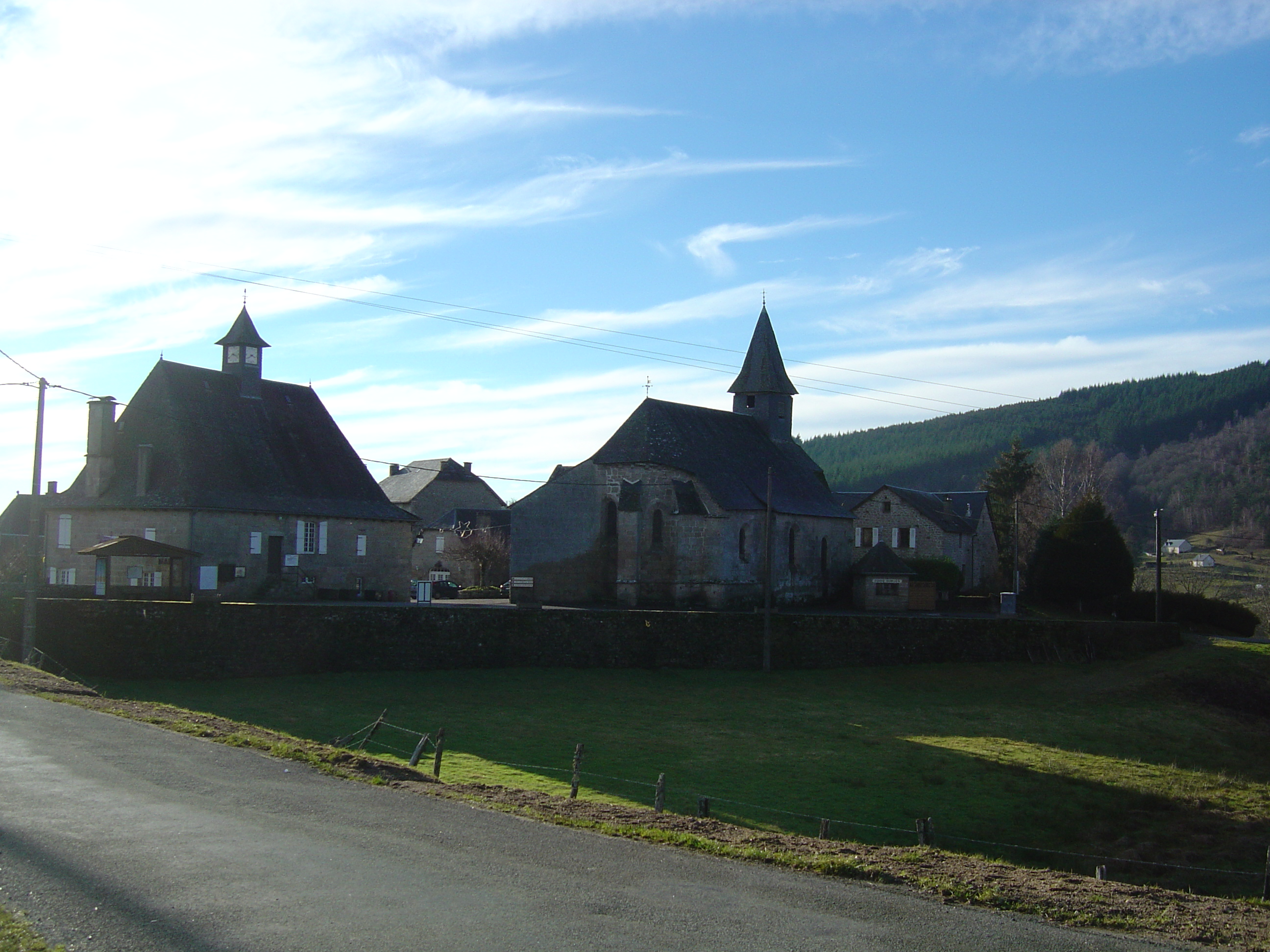 Eglise de Chaumeil